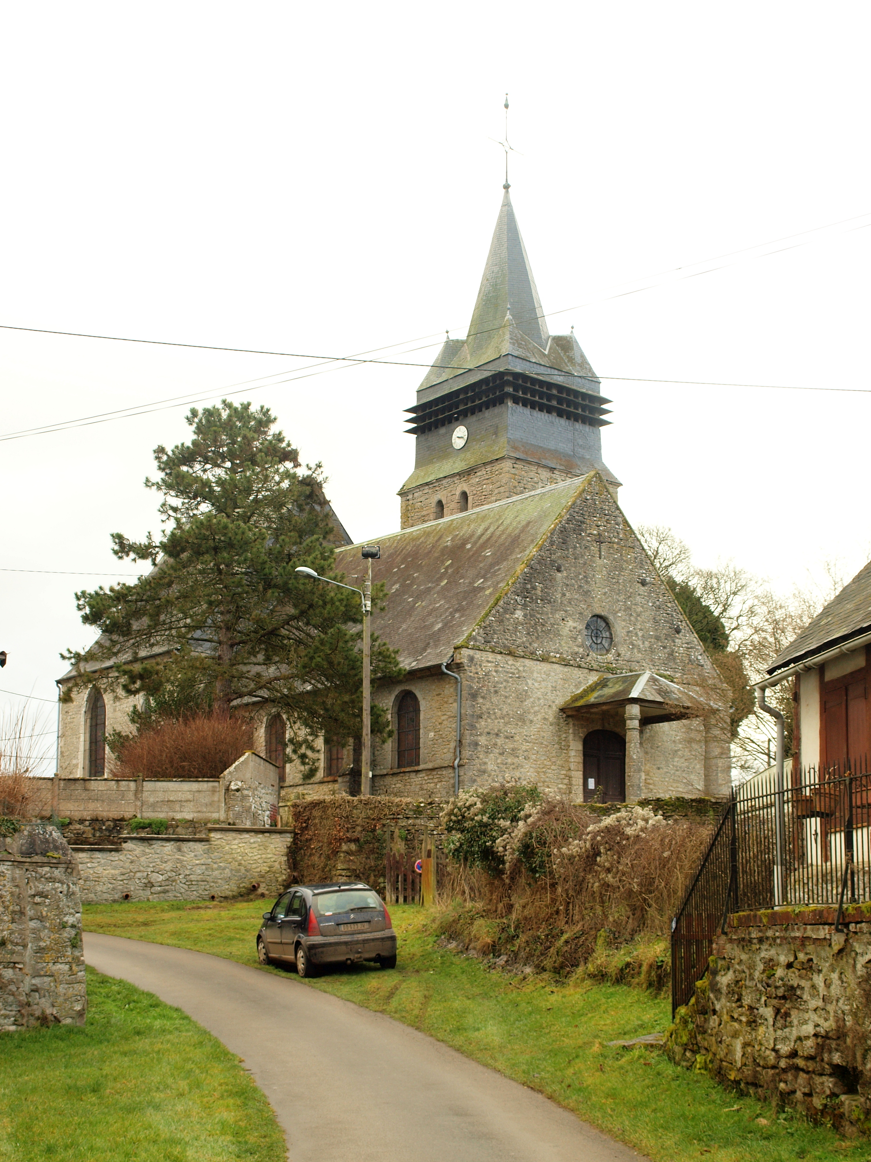 Haussez (Seine-Maritime, France)